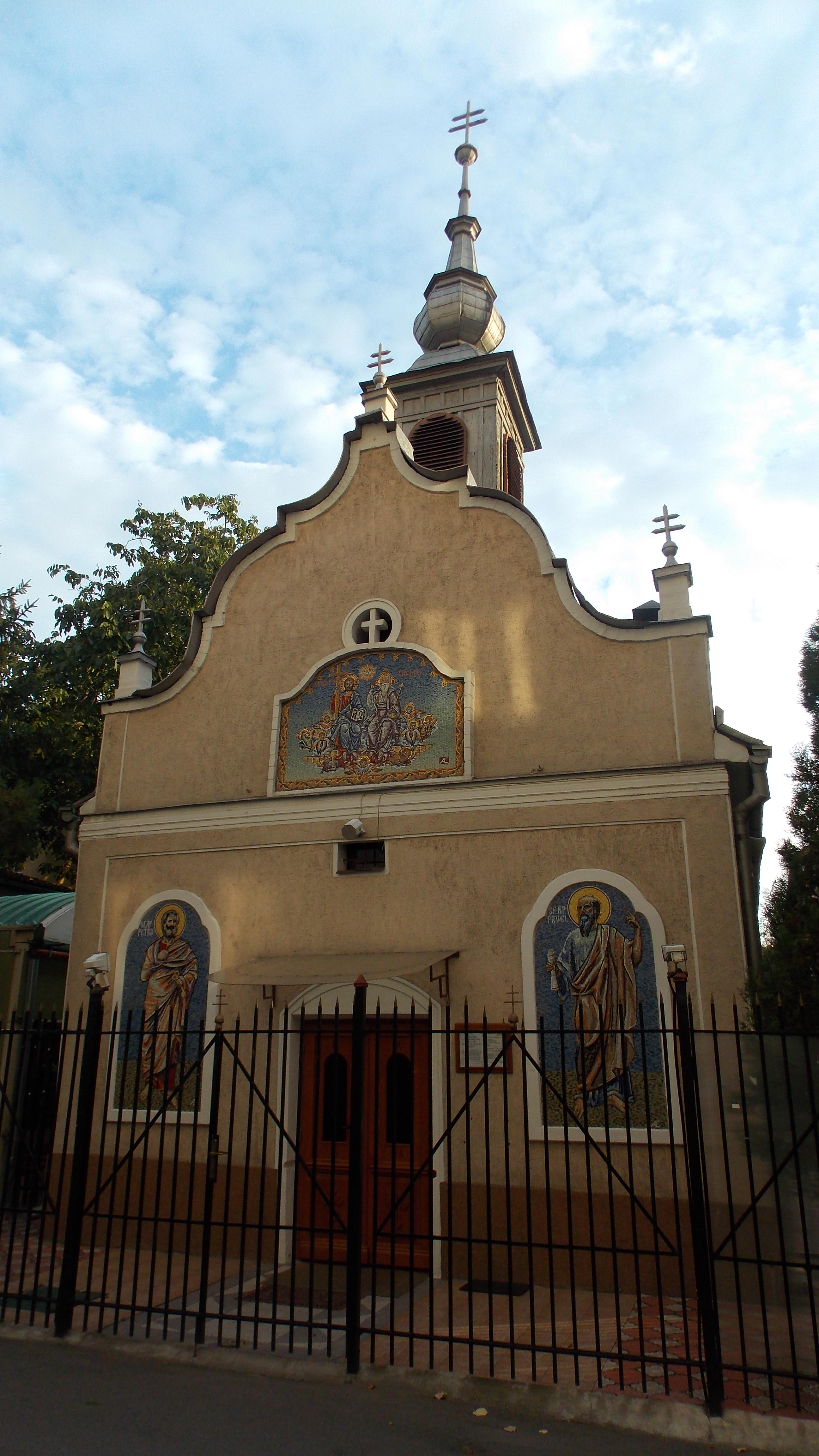 Biserica ortodoxă "Sf. Treime", (fosta Biserică romano-catolică "Sf. Brigitta", fosta biserică ruteană)